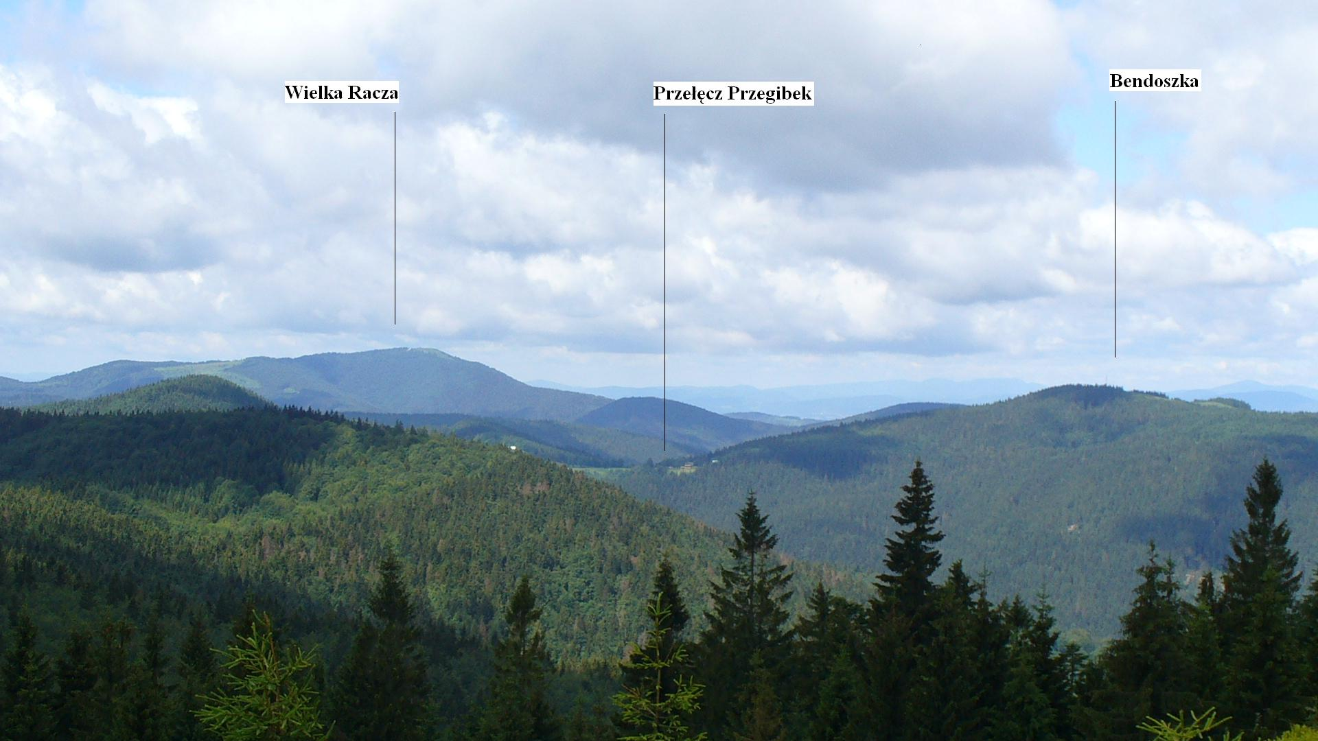 Grupa Wielkiej Raczy - Beskid Żywiecki